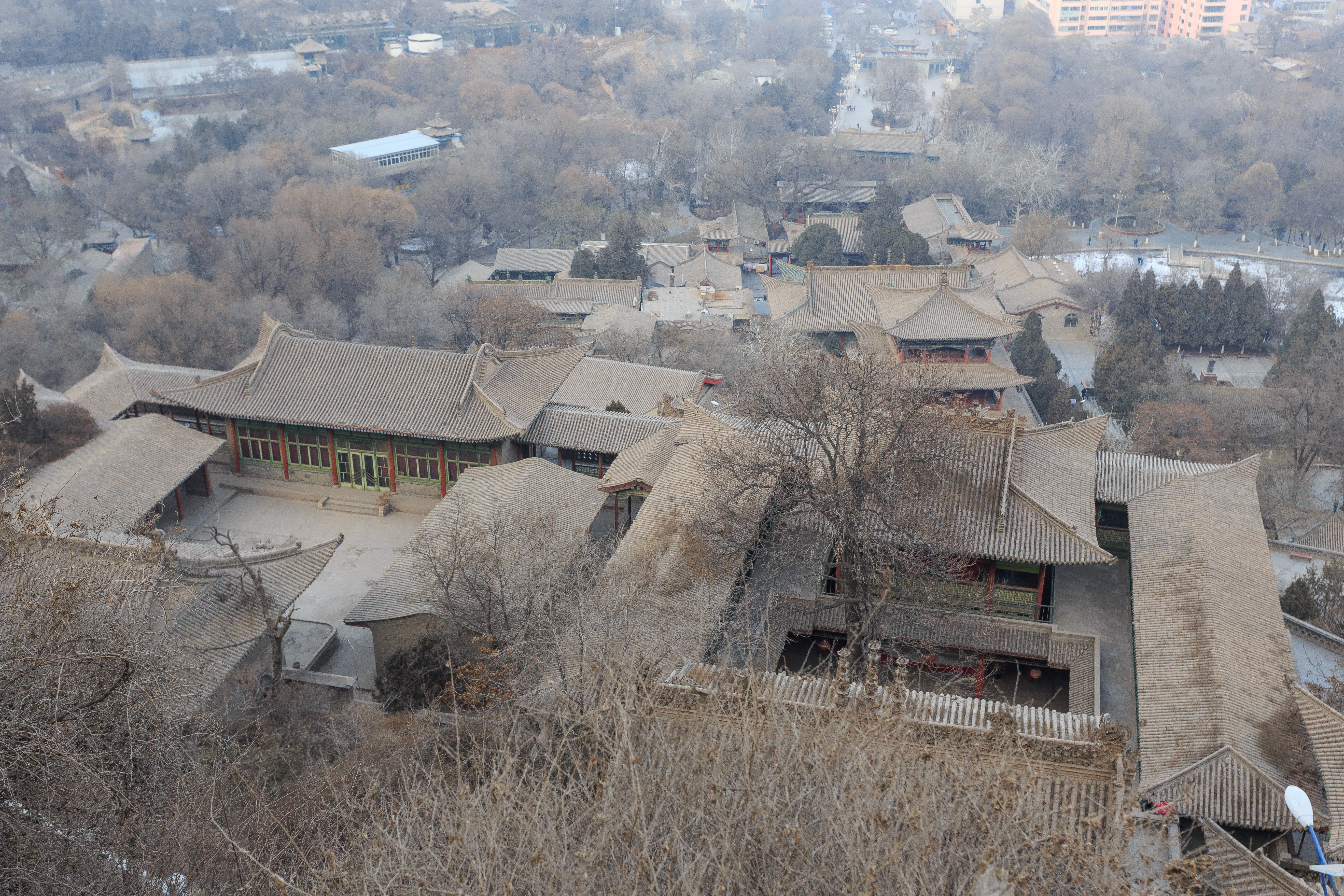 兰州五泉山建筑群